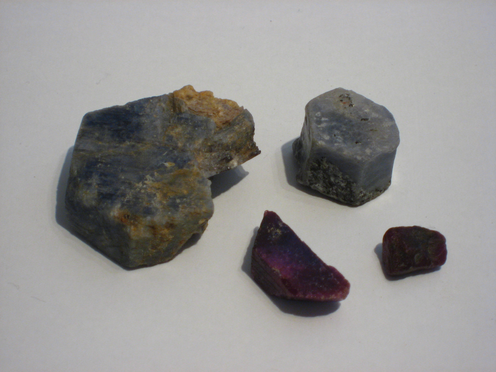 Sinisiä ja punaisia korundikiteitä.